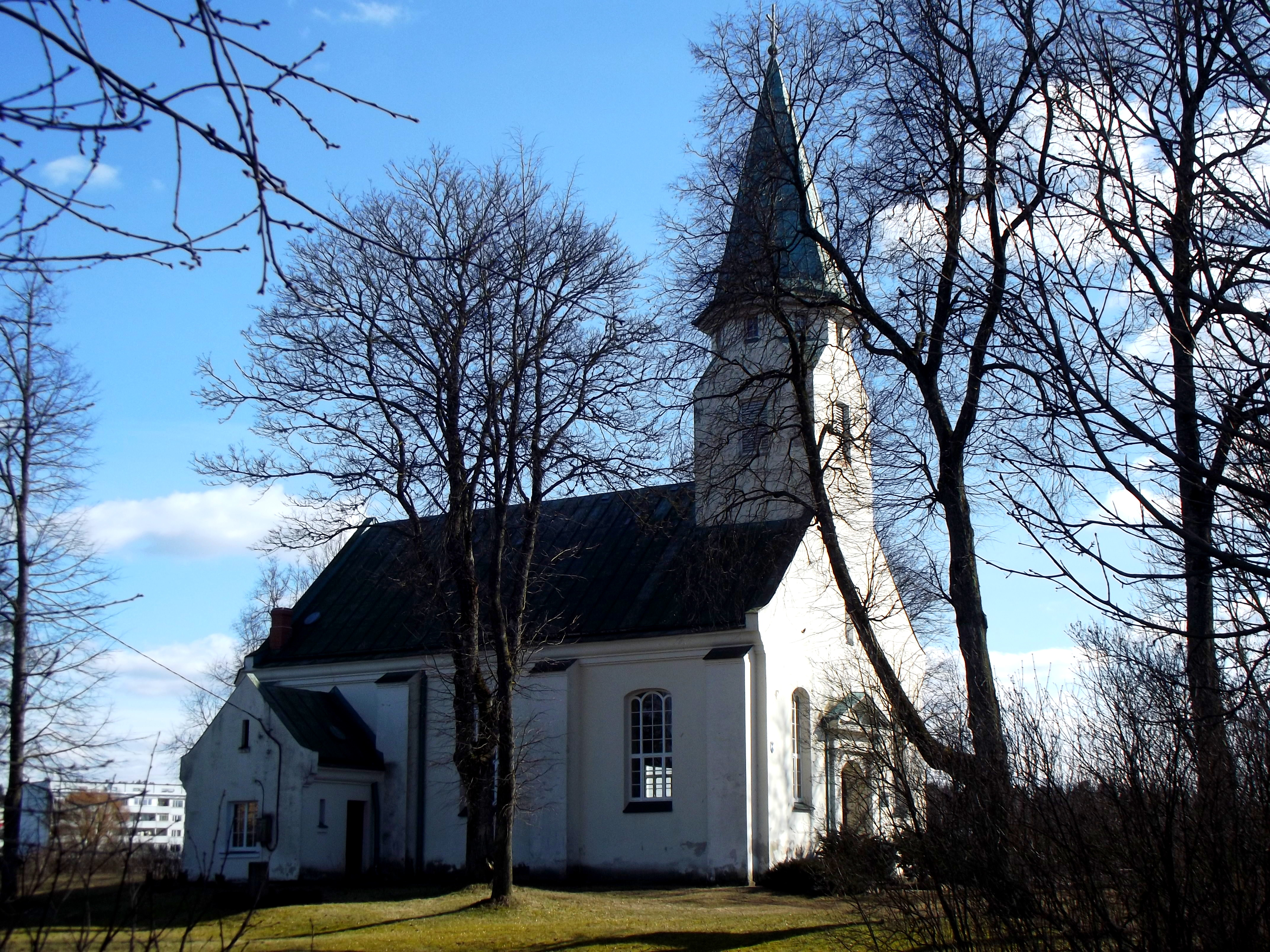 Olaines luterāņu baznīca